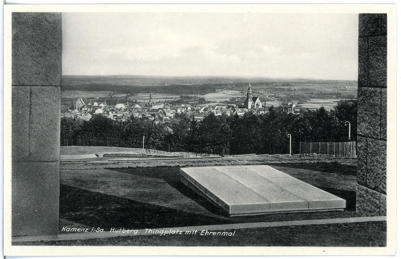 Kamenz; Hutberg, Thingplatz und Ehrenmal This postcard is from publisher Brück & Sohn in Meißen ( postcard has a unique number 26627 and is available in a higher resolution at the publisher. This images was uploaded in a cooperation project between Wikipedians and the publisher.